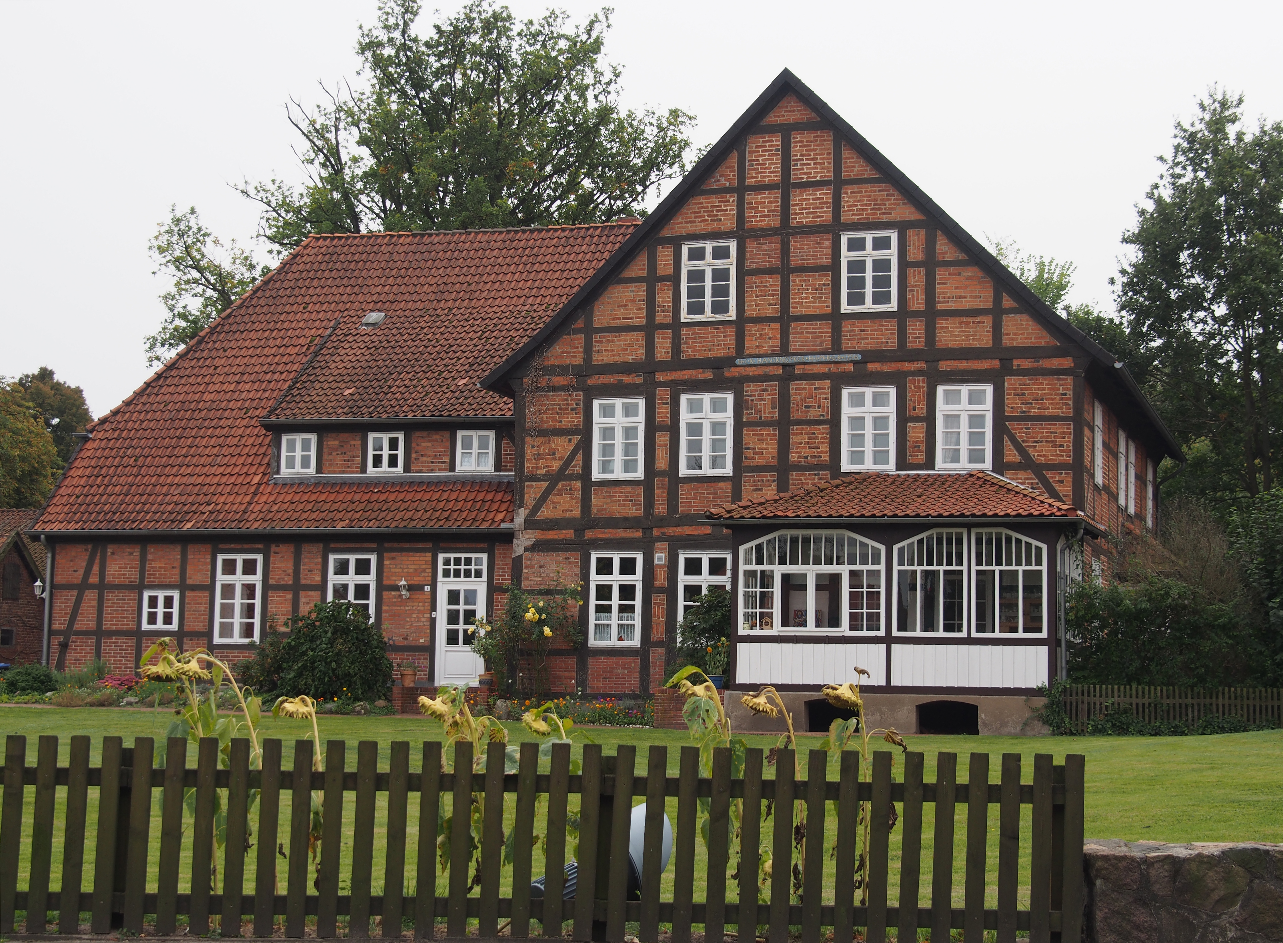 Pfarhaus, Bahnhofstr. 1 in Eldingen, Niedersachsen (Germany)